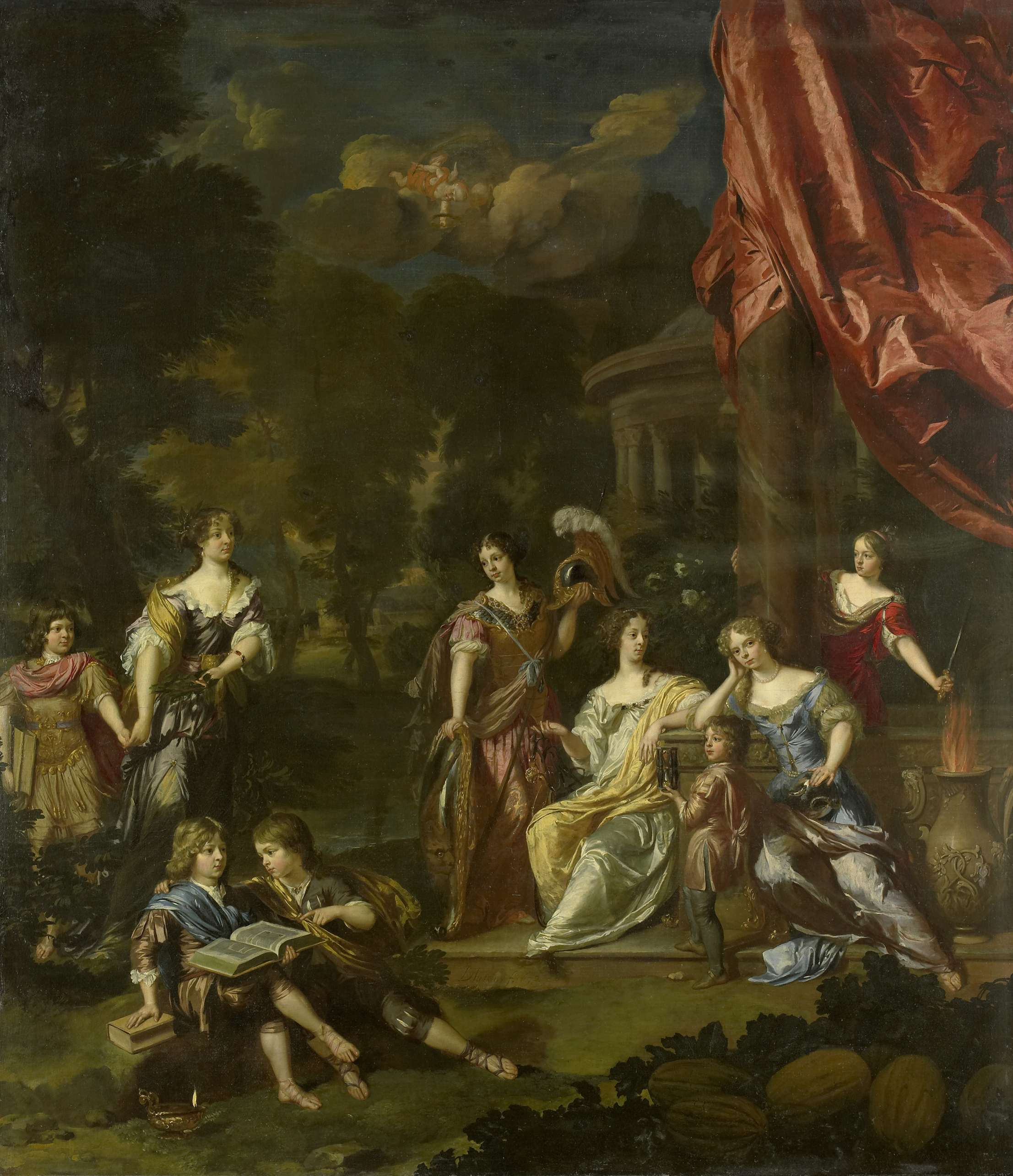 Geportretteerd in een tuin bij een klassieke tempel naar leeftijd: Maria (geb. 1741) links met een lauwertak, Alida (geb. 1660) zittend met een toom of breidel, Theodora Catharina (geb. 1661) met een slang en een globe, Bernardina (ca. 1662-1716) met een schild, helm, speer en gouden kuras, Suzanna (1664-1712) met een zwaard boven een vuur, Adriaan Willem (1667-88) helemaal links in Romeins kostuum, Pieter (geb. 1666) en Lodewijk (1668-97) op de voorgrond met een boek en een olielamp, François Adriaan (1669-1726) met een zandloper en Philippina, als kind overleden, in de lucht als putto met een palmtak en krans. Rechts op de voorgrond groeien kalebassen, pompoenen of meloenen.